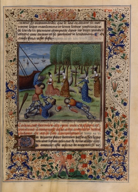 Hercule au jardin des Hespérides département Manuscrits occidentaux cote du document FRANCAIS 59 collection ou fonds Louis de Bruges ; librairie de Blois période du document Moyen âge date du document ou du recueil 1470? partie de Recueil des histoires de Troie. - Bruges folio, pagination Folio 119 auteur(s) Maître de la Chronique d'Angleterre (Enlumineur) Le Fèvre, Raoul (14..-14..) (Auteur) catégorie Manuscrits à peinture matériau(x) Parchemin